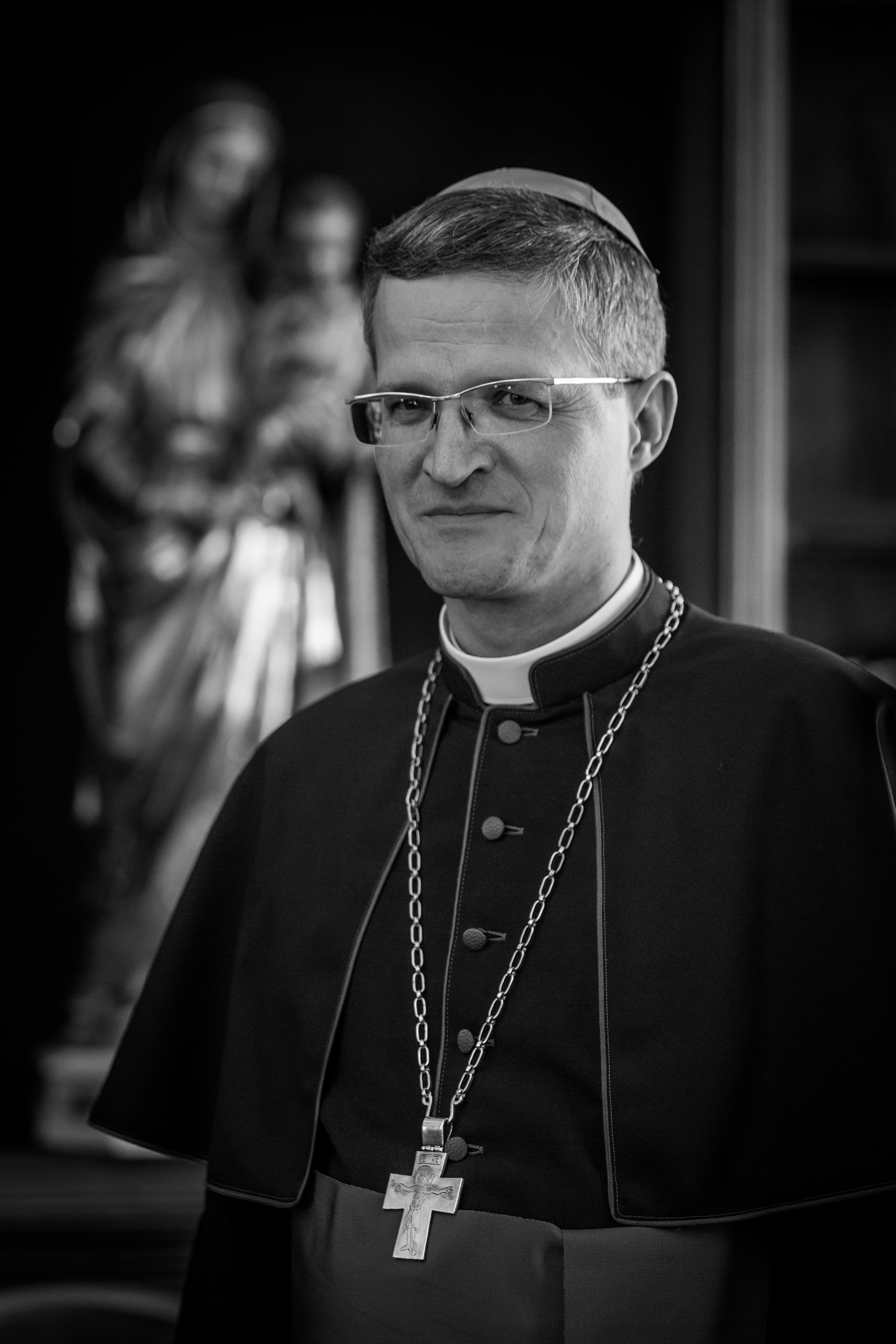 Mgr Xavier Malle, évêque de Gap et d’Embrun.